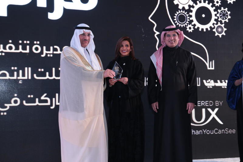 مرام البتيري اثناء استلام الجائزة في بداية عام 2019